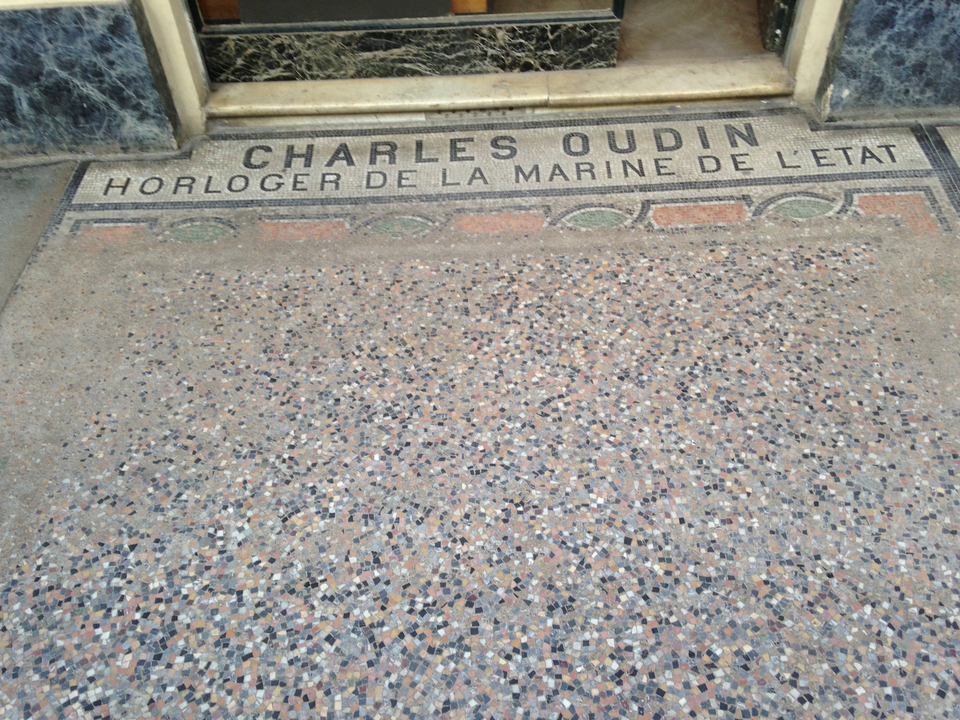 Mosaique devant l'ancienne boutique de Charles Oudin au Palais Royal